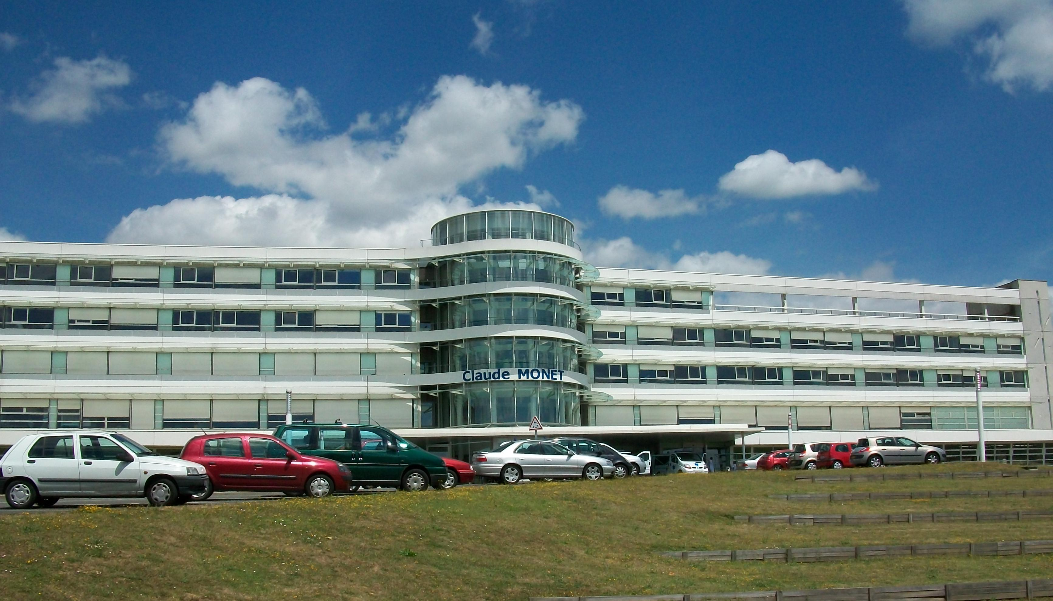 Le pavillon Claude Monet, à l'intérieur de l'hôpital du Mans, un pavillon moderniste